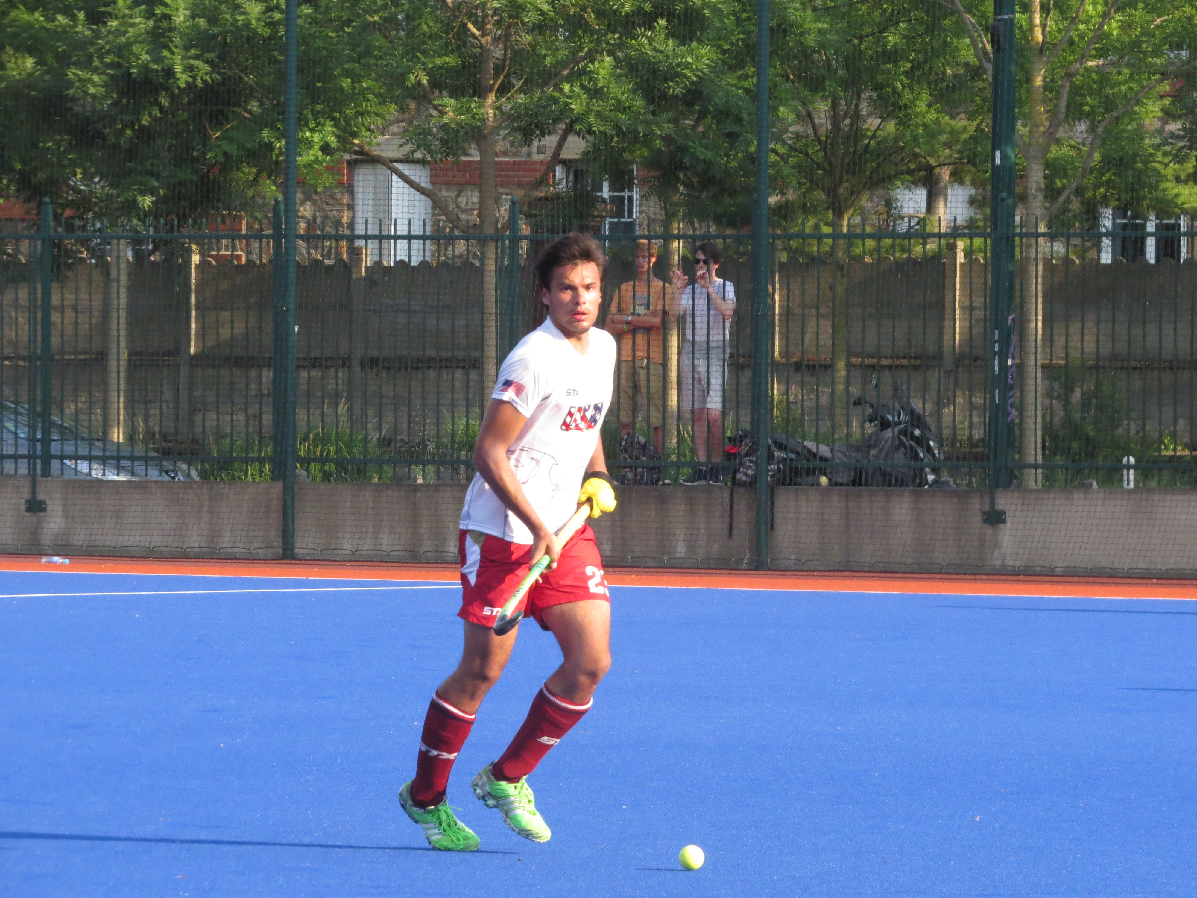 Match amical de hockey sur gazon entre la France et les USA à Montrouge le 21 juin 2017.